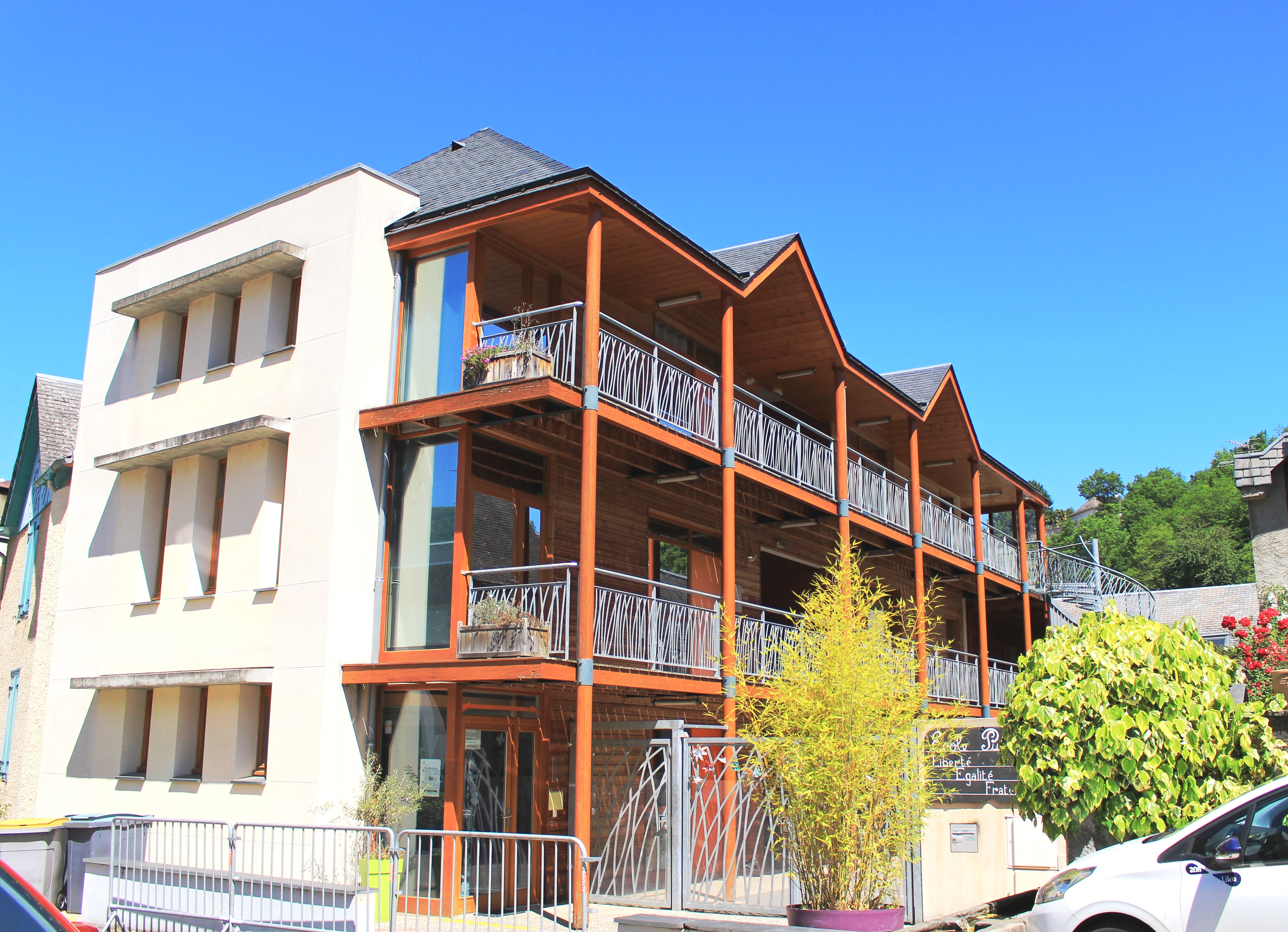 École de Gerde (Hautes-Pyrénées)